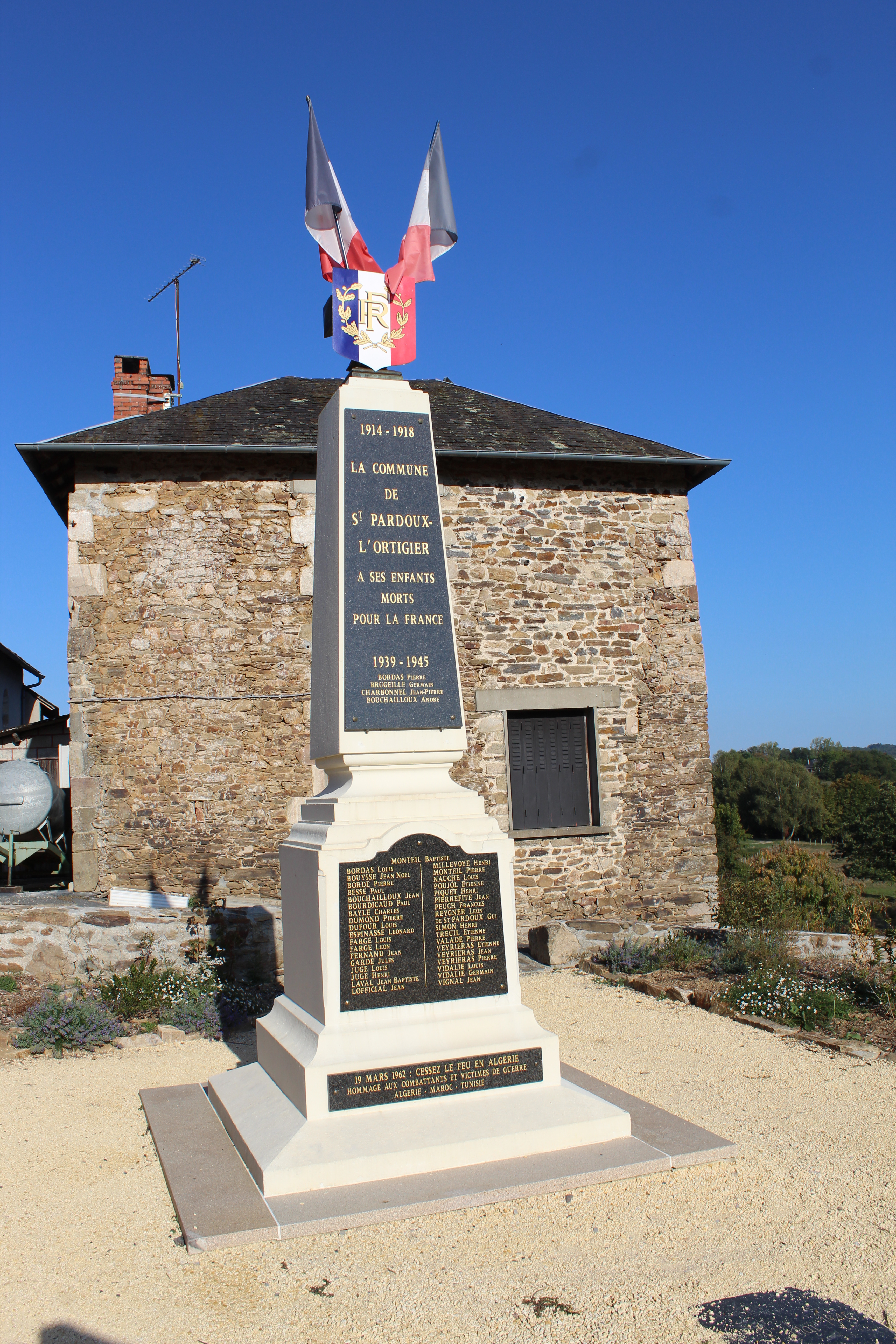 Le monument aux xmorts